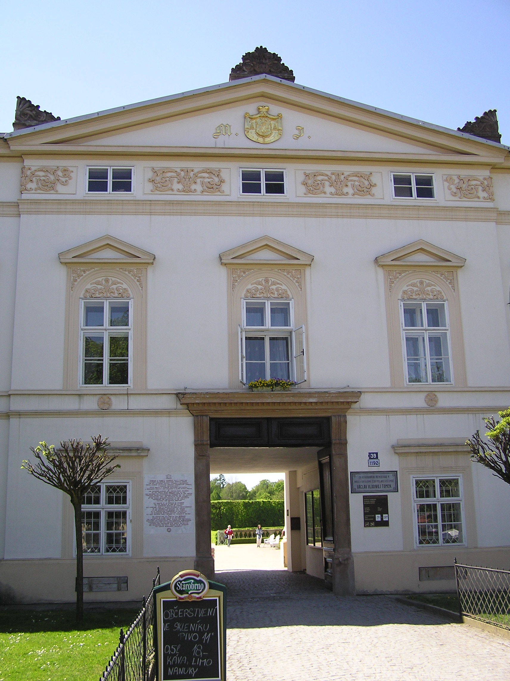 Vstup do Květné zahrady v Kroměříži; Entrance to the Flower Garden in Kroměříž